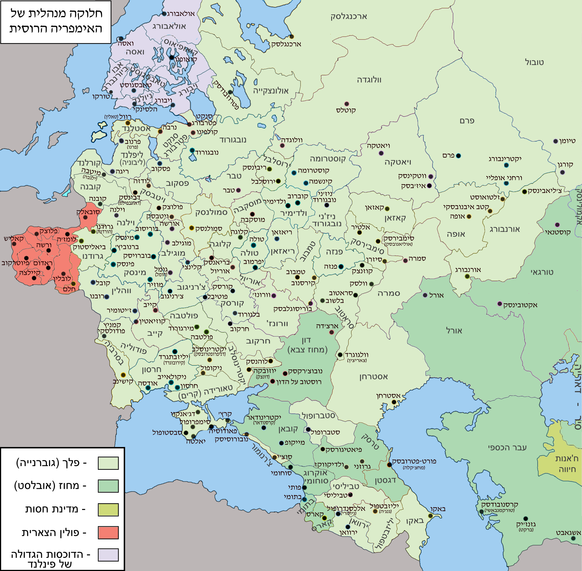 Административное деление России (западная часть) в 1917